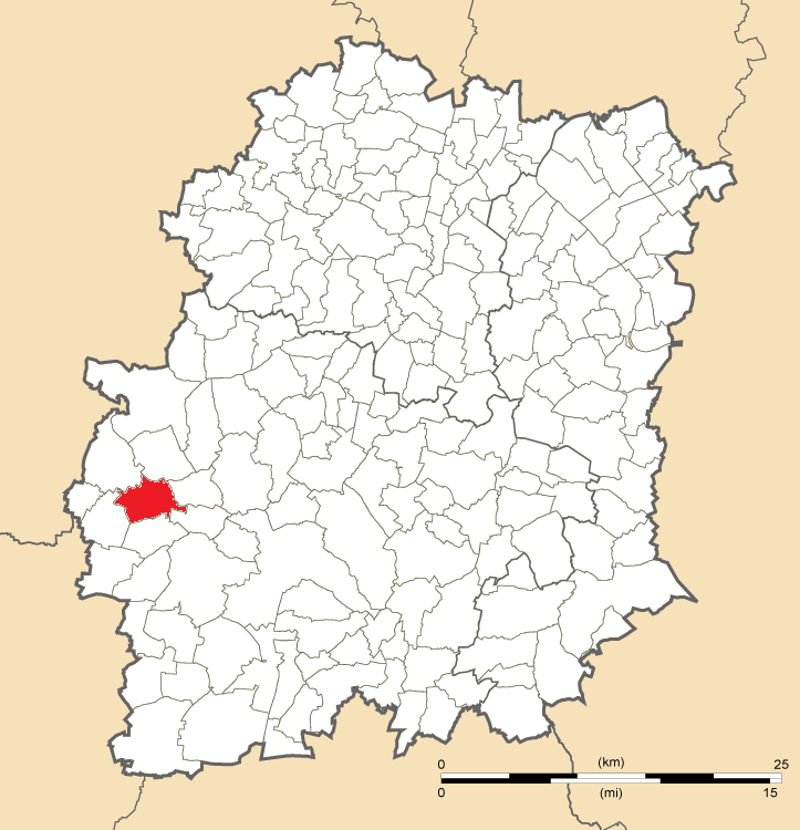 Carte de position de Richarville en Essonne (91)